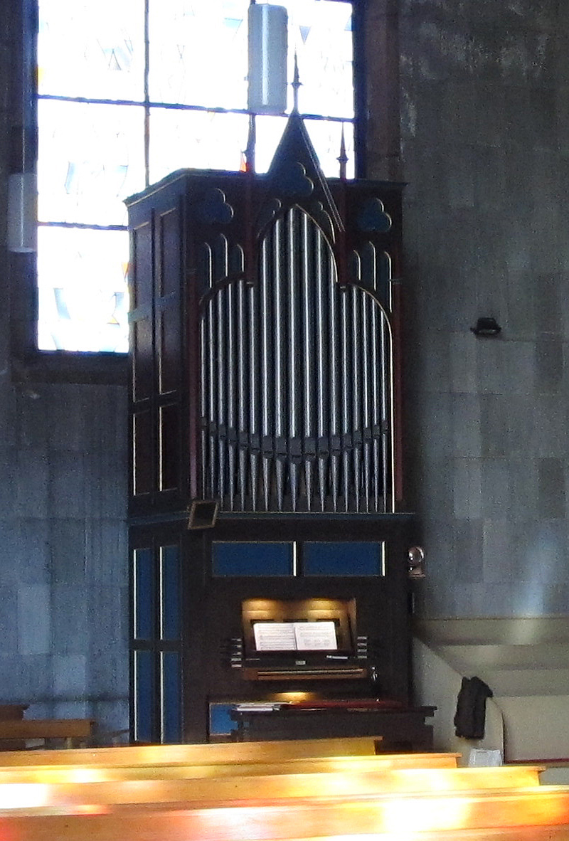 Orgel der kath. Kirche St. Remigius in Beeden, Saarland